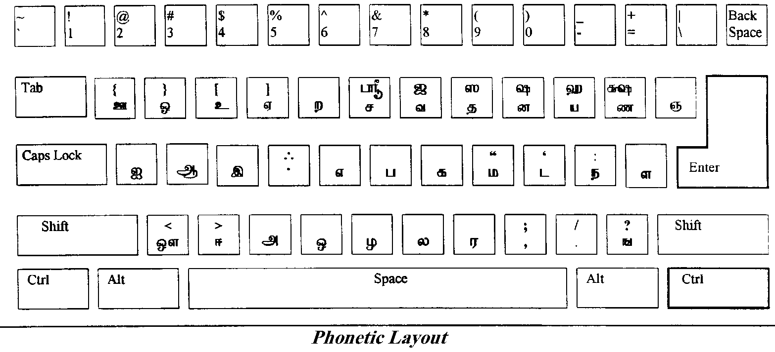 தமிழ் ஒலியியல் முறை விசைப்பலகை தளக்கோலம்